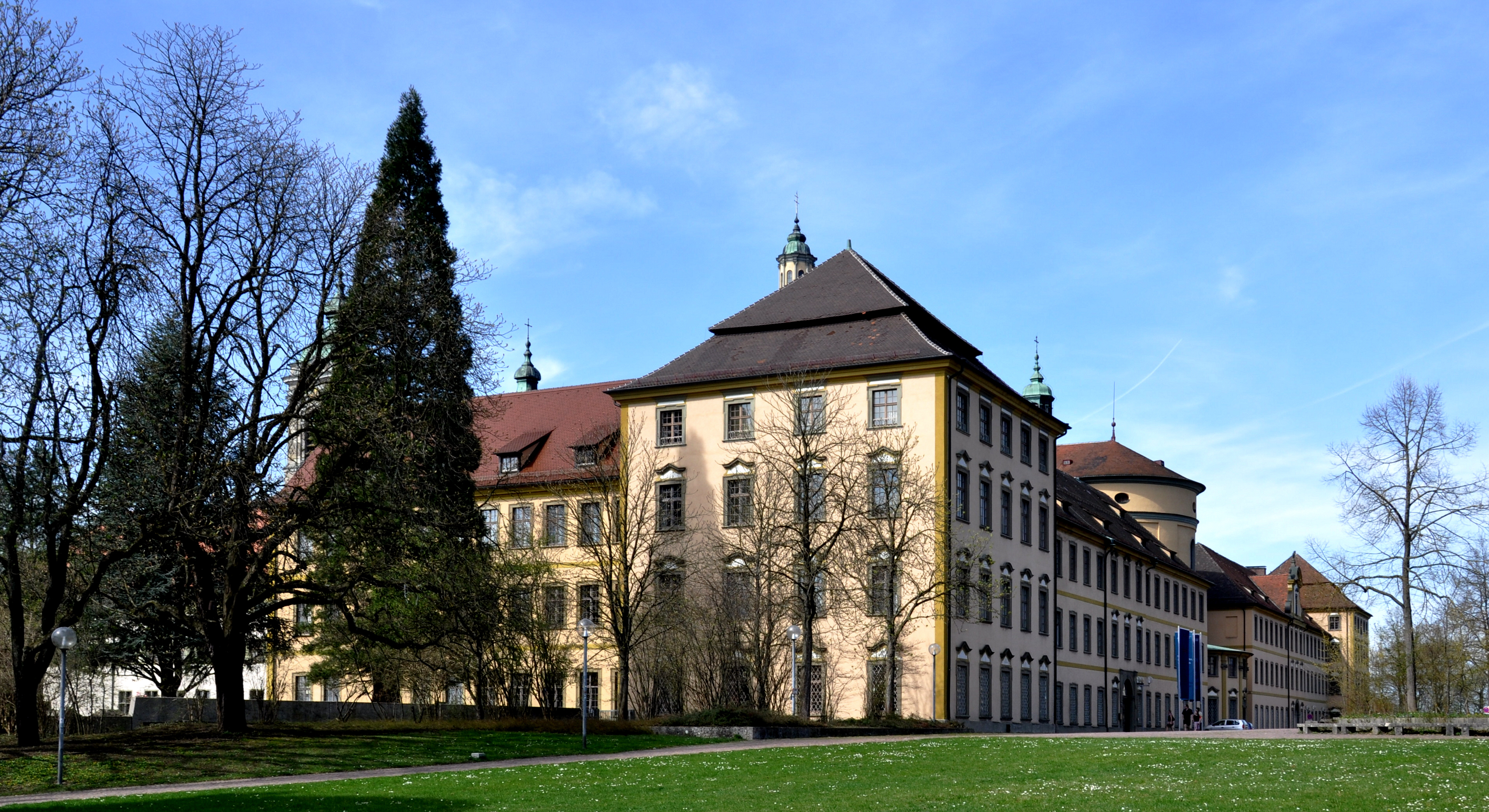 Weingarten (Württemberg), ehem. Kloster Weingarten, Ostfassade (bis in den Bildhintergrund), vorne der Seminarbau (heute Akademie der Diözese), vorne links der „Reichsflügel“ (heute Teil der Akademie der Diözese)